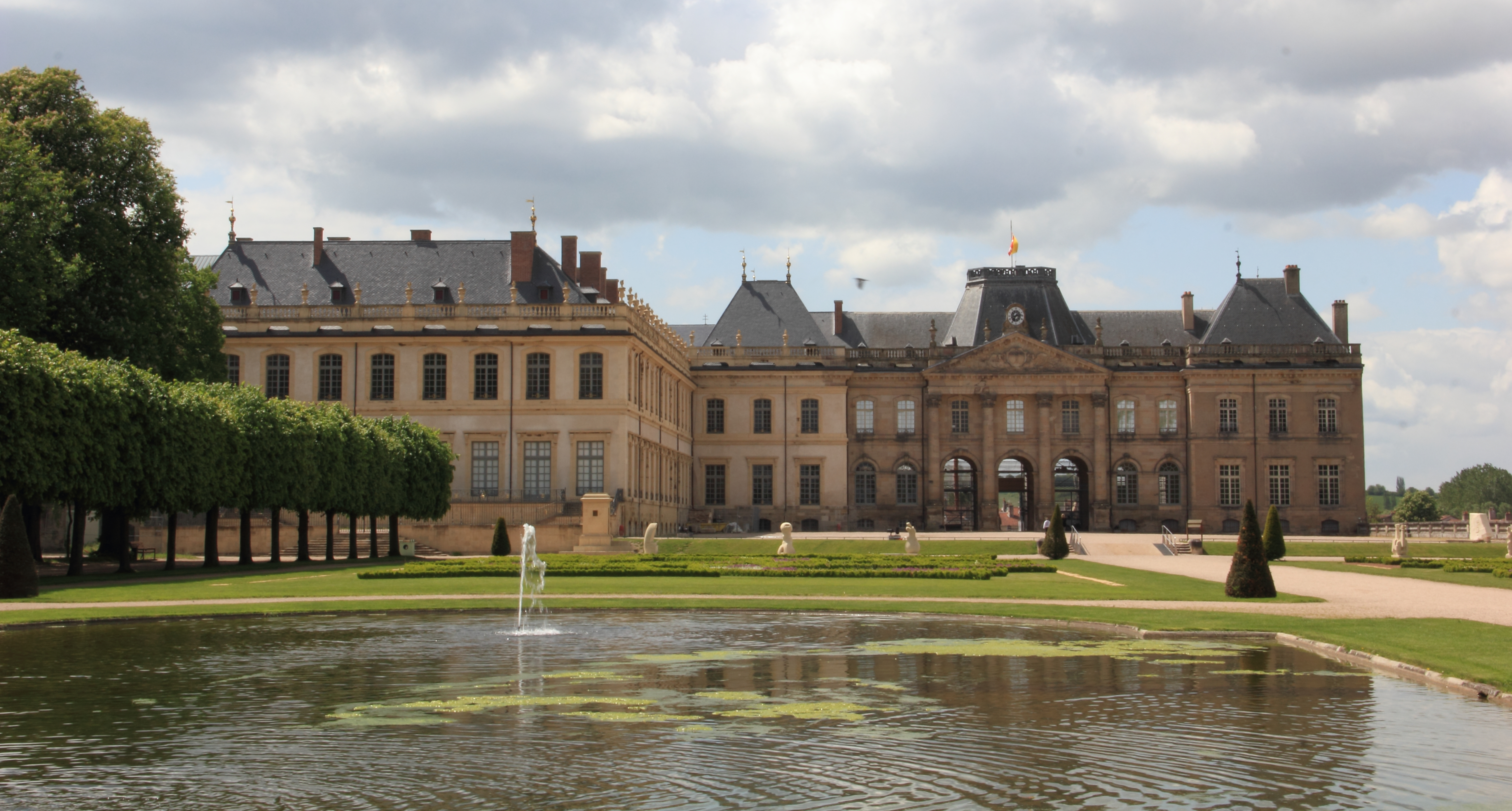 Fontaine des jardins à la française du château de Lunéville (façade Est).